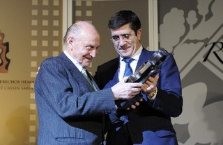 El Lehendakari Patxi López entrega el Premio René Cassin de Derechos Humanos a Marcos Ana (14 de enero de 2010).